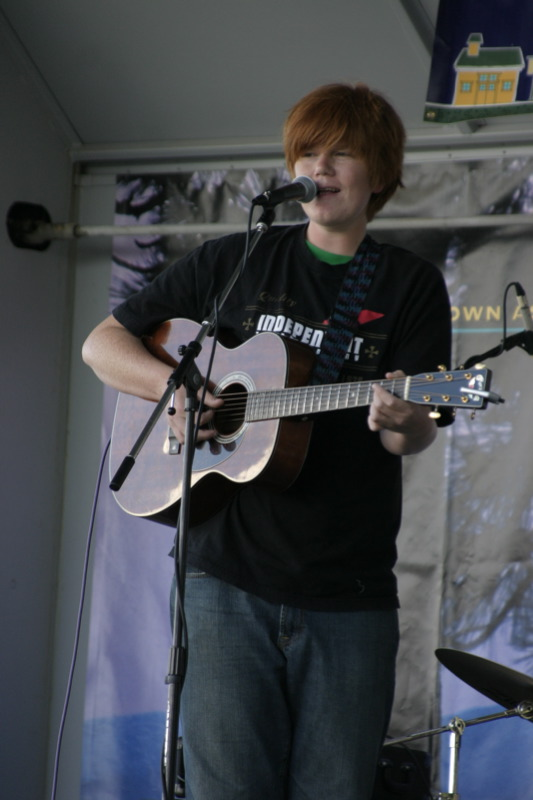 Brett Dennen live in concert.